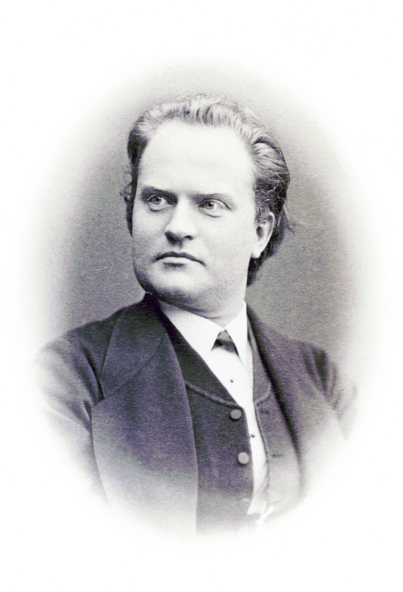 Robert Ohlsson, sångare vid Kungliga Operan 1862